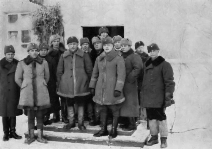 Talvisodan 9. Divisioonan esikunta Raatteen taisteluiden jälkeen.